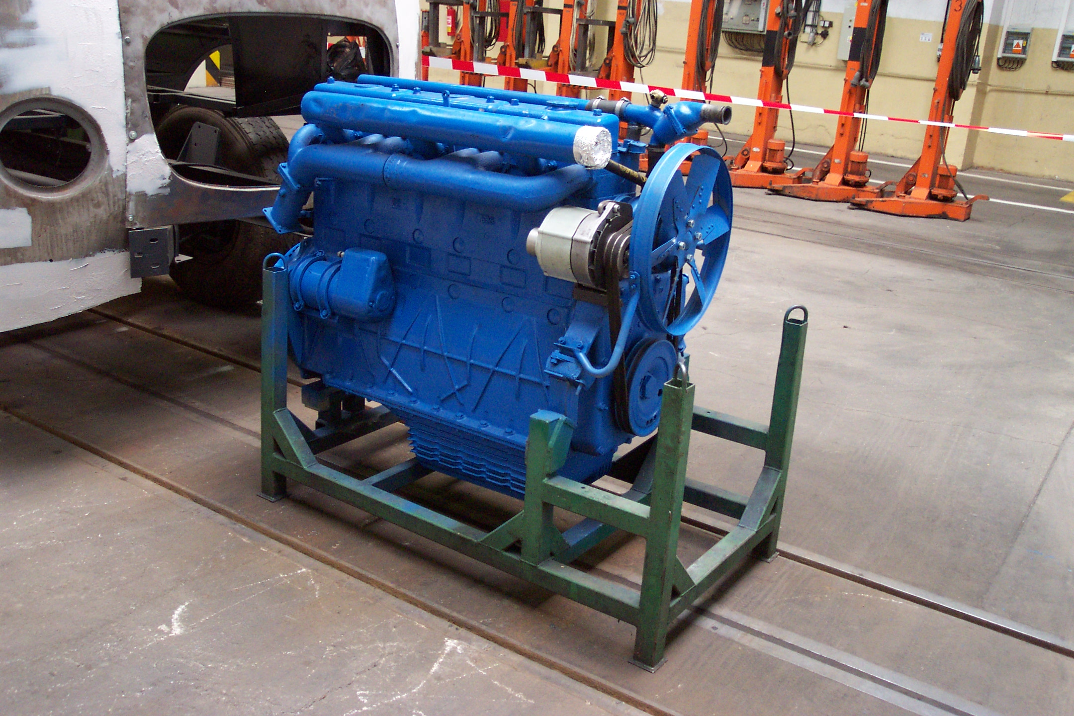 Historical Škoda RTO MEX bus, under reconstruction - Historický autobus typu Škoda RTO MEX procházející rekonstrukcí